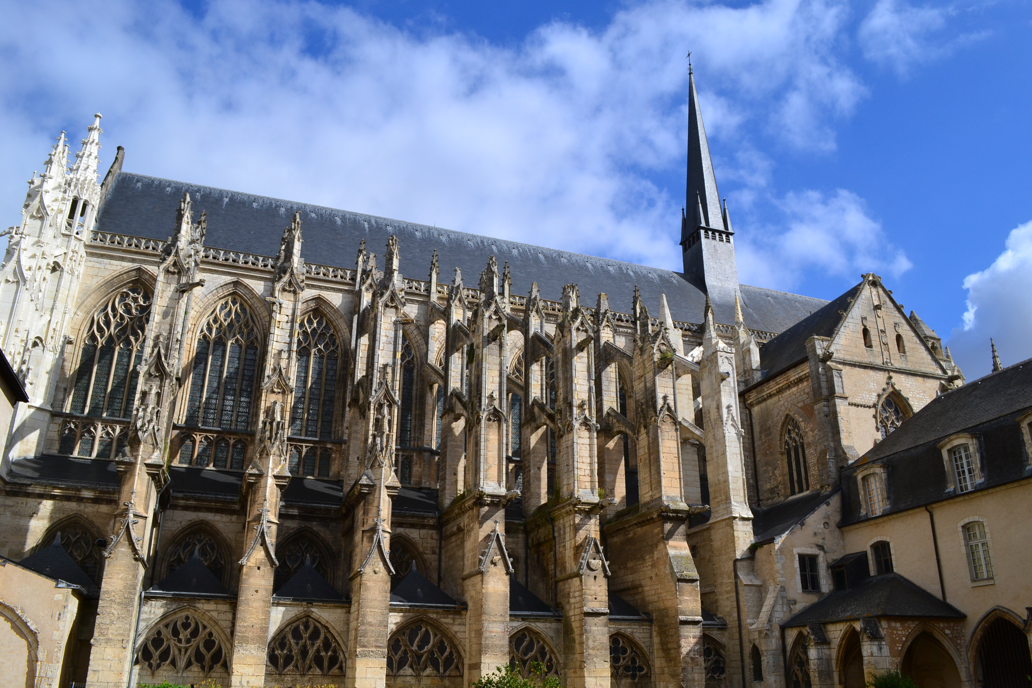 L'église de la Trinité date des 12e, 13e, 14e et 15e siècles, tandis que l'ancienne abbaye de la Trinité date des 14e, 16e, 17e et 18e siècles. L'abbaye a été fondée en 1034 Par Geoffroy Martel, comte de Vendôme. Elle comprenait les bâtiments conventuels avec de nombreuses dépendances et des constructions affectées aux usages profanes et aux besoins matériels de la communauté. Au sud de l'église abbatiale se trouvaient cloîtres, réfectoires, chapître, bibliothèque, archives, logements... Le reste de l'abbaye, greniers, habitations des laïques, dépendances diverses, se trouvait en dehors de l'enceinte. Les cloîtres, disparus en partie, avaient été construits au début du 16e siècle. Les bâtiments furent vendus en 1791. This building is en partie classé, en partie inscrit au titre des Monuments Historiques. .